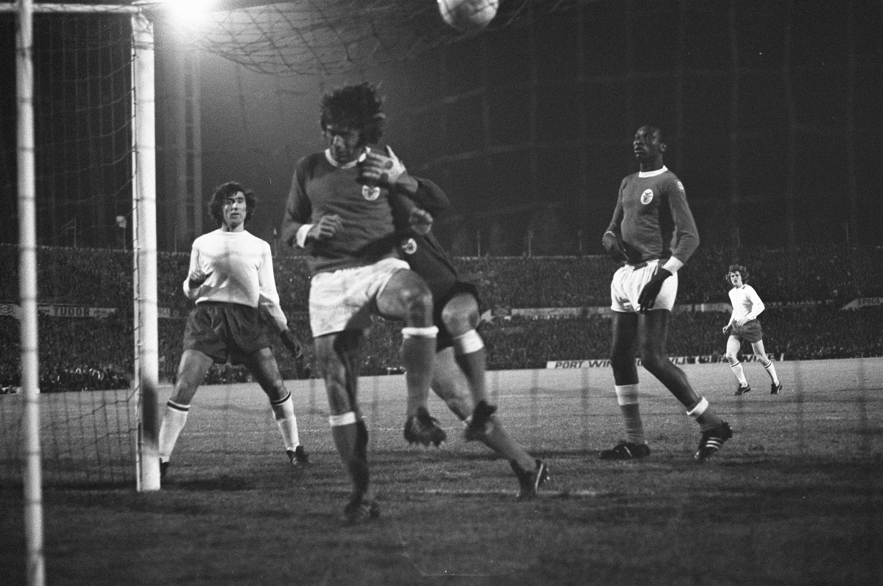 Collectie / Archief : Fotocollectie Anefo Reportage / Serie : Benfica tegen Ajax, uitslag 0-0 Beschrijving : Halve finale Europacup-I, spelmoment Datum : 19 april 1972 Locatie : Lissabon, Portugal Trefwoorden : sport, voetbal Fotograaf : Fotograaf Onbekend / Anefo Auteursrechthebbende : Nationaal Archief Materiaalsoort : Negatief (zwart/wit) Nummer archiefinventaris : bekijk toegang 2.24.01.05 Bestanddeelnummer : 925-5415